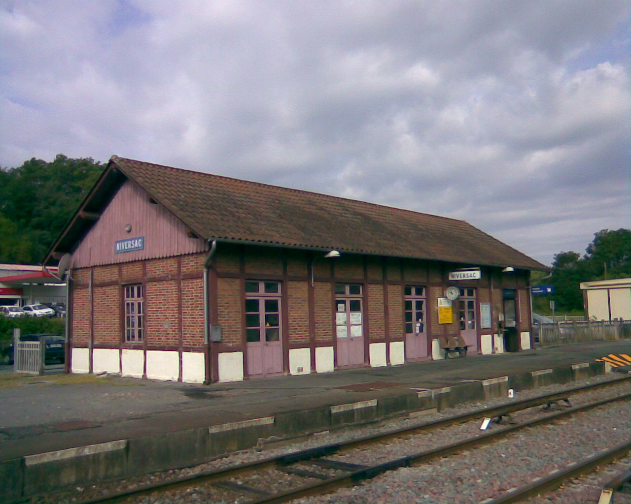 Gare de Niversac (commune de Saint-Laurent-sur-Manoire, Dordogne) : le bâtiment voyageurs sur le quai pour la direction de Périgueux